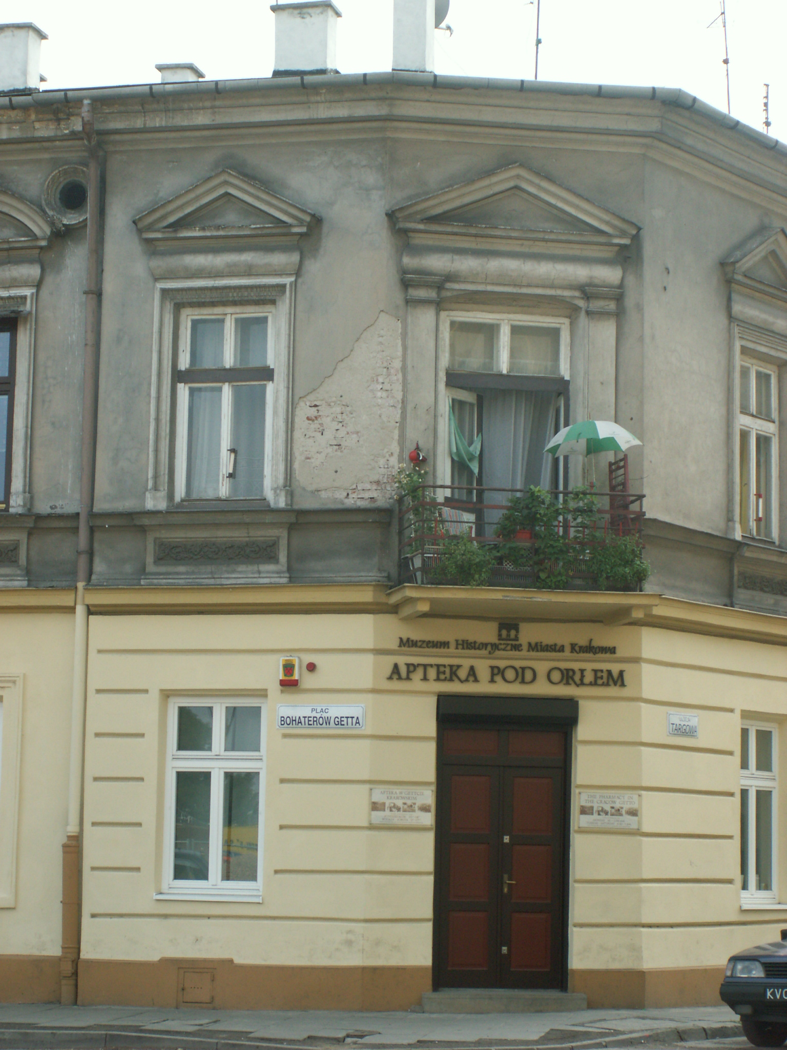 Apteka Pod Orłem w Krakowie August 2005